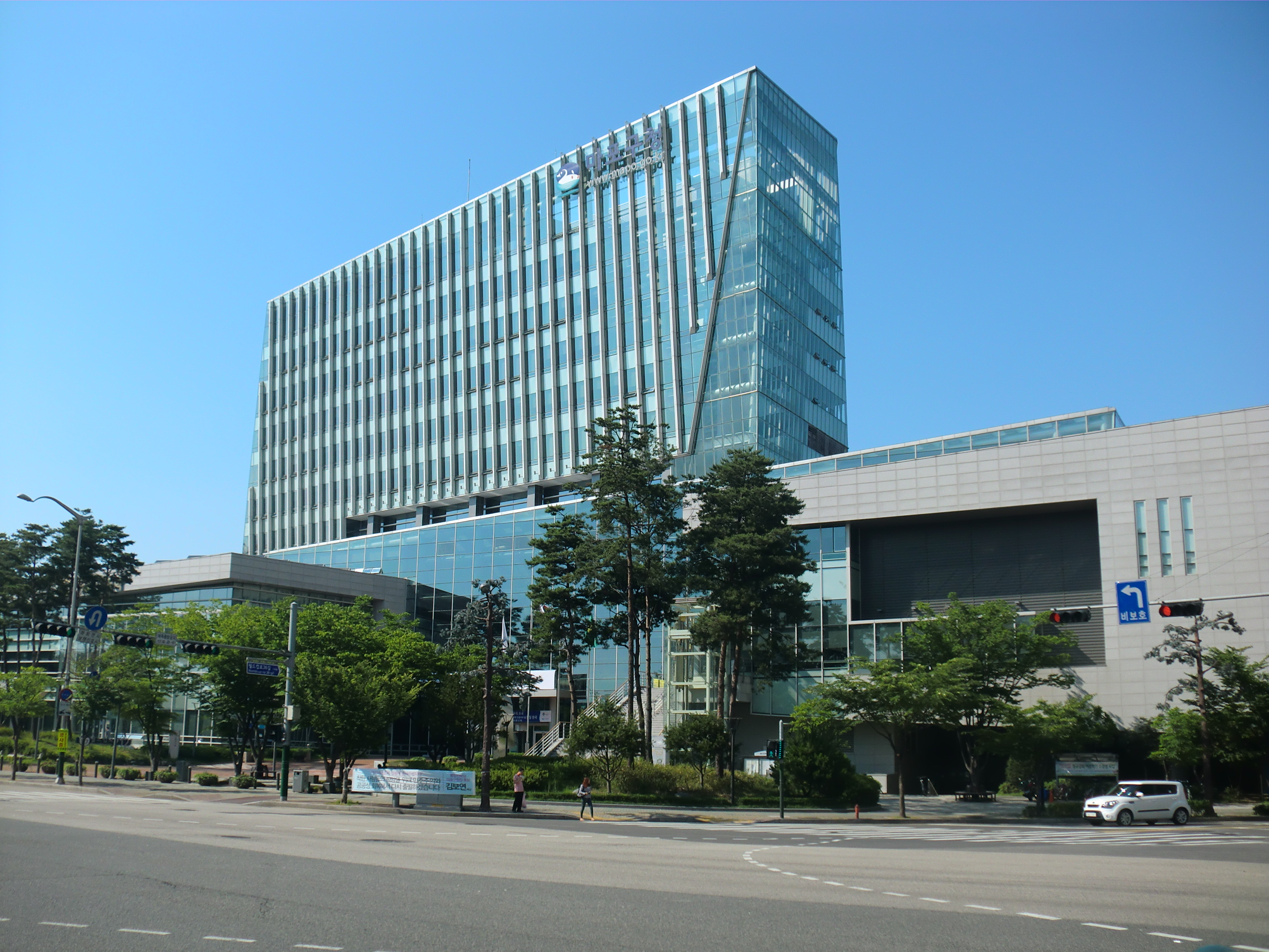 서울특별시 마포구에 있는 마포구청